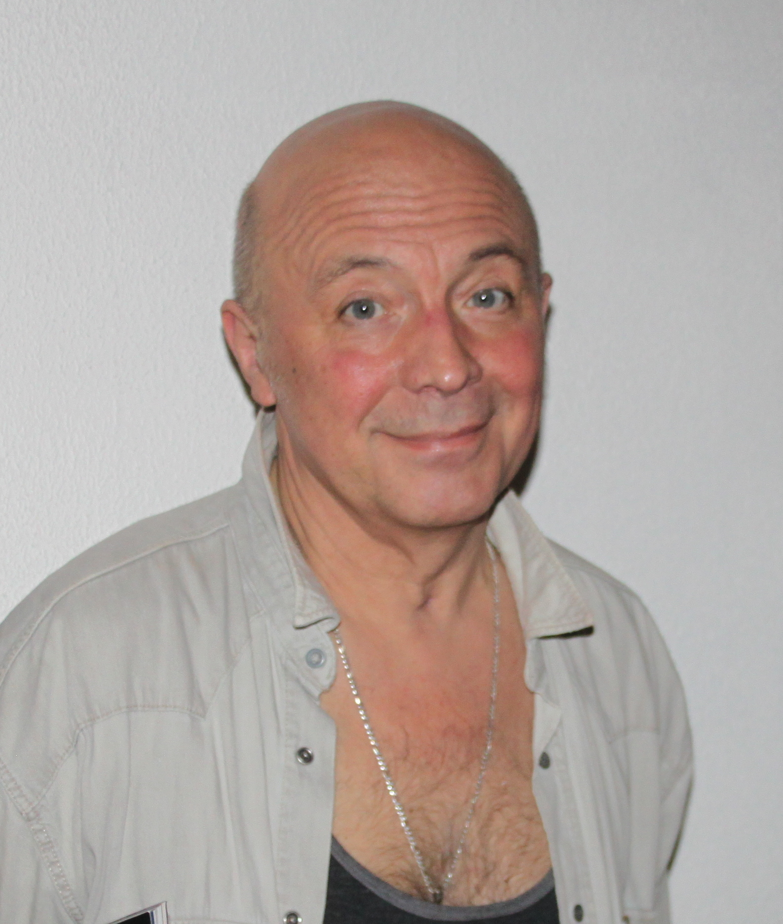 Белякович, Валерий Романович советский и российский актёр, художественный руководитель Московского драматического театра им. Станиславского